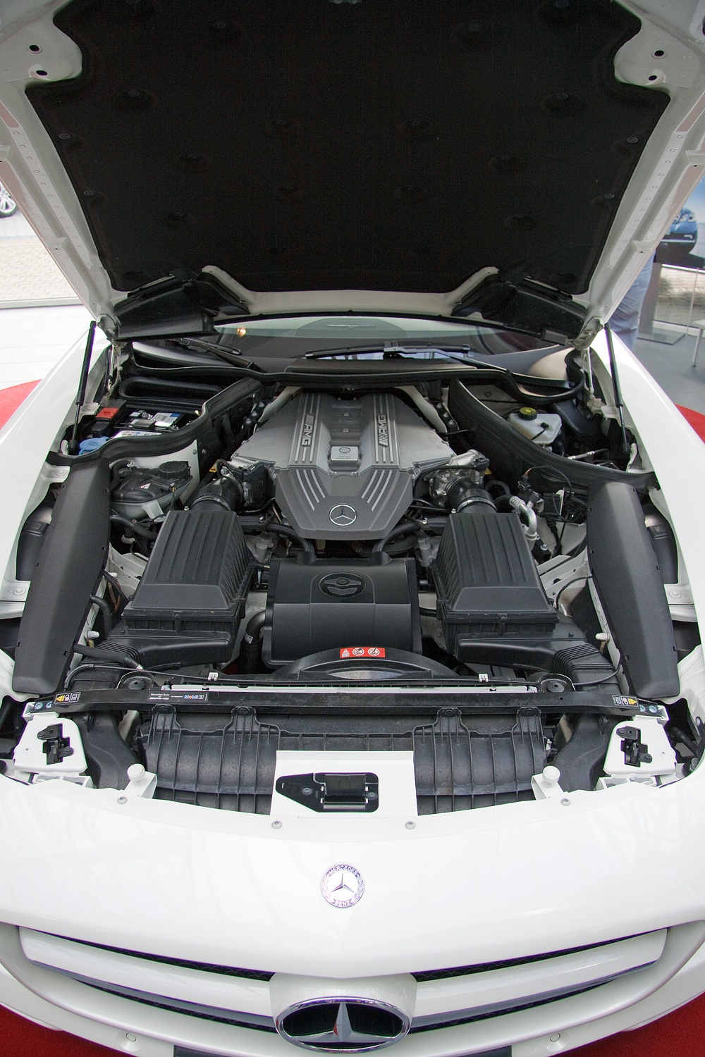 DTM Aktionstag Ostendorf Hamm, Datum/Uhrzeit: 28.08.2010 10:01:34